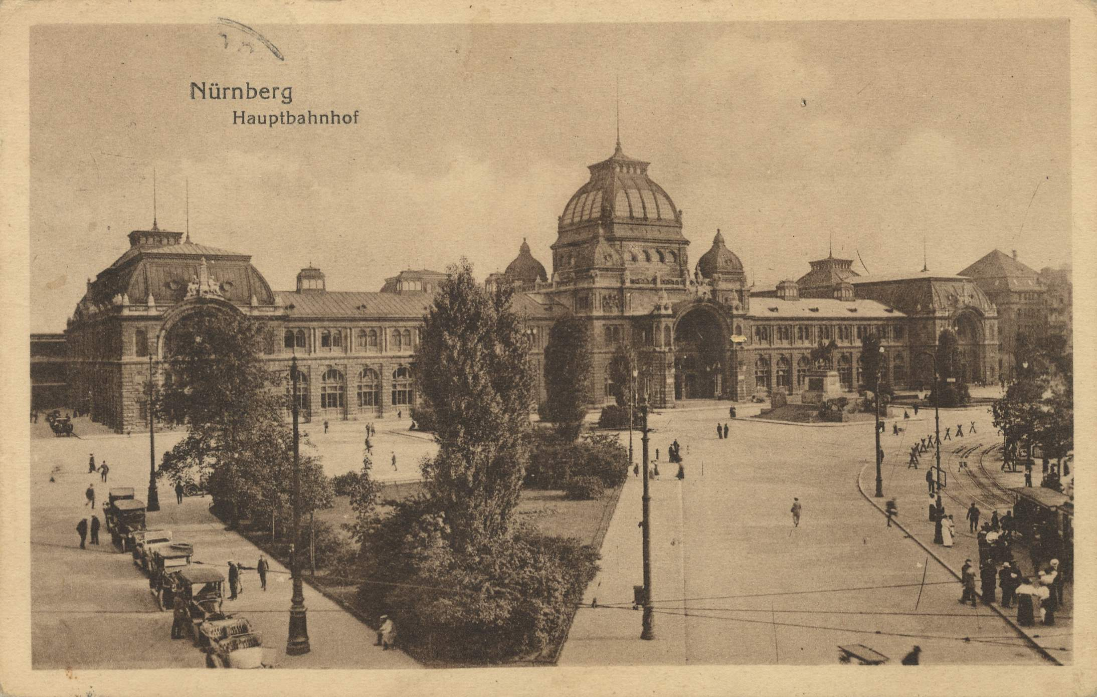 Nürnberg Hauptbahnhof auf einer Feldpostkarte im Jahr 1918